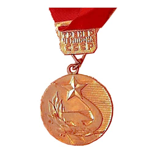 Медаль врученная в 1972 Грекову Эдуарду Николаевичу